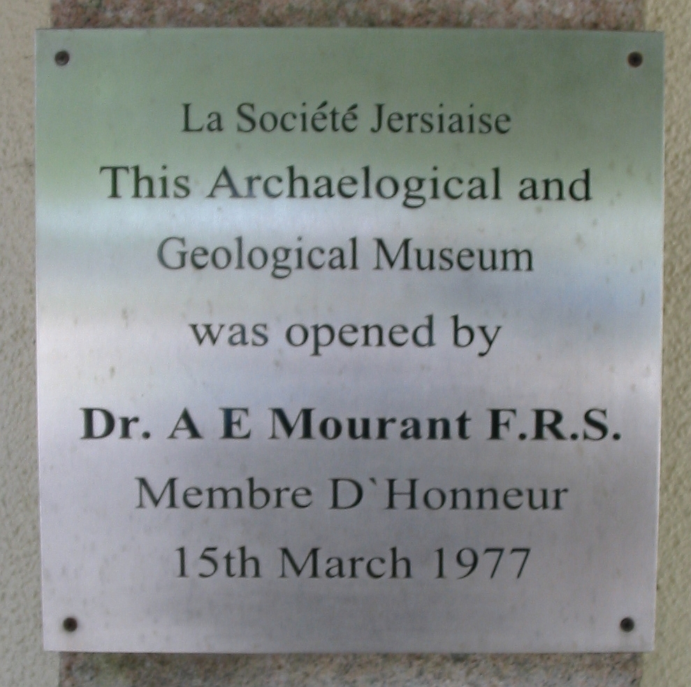 Nrf: Jèrri